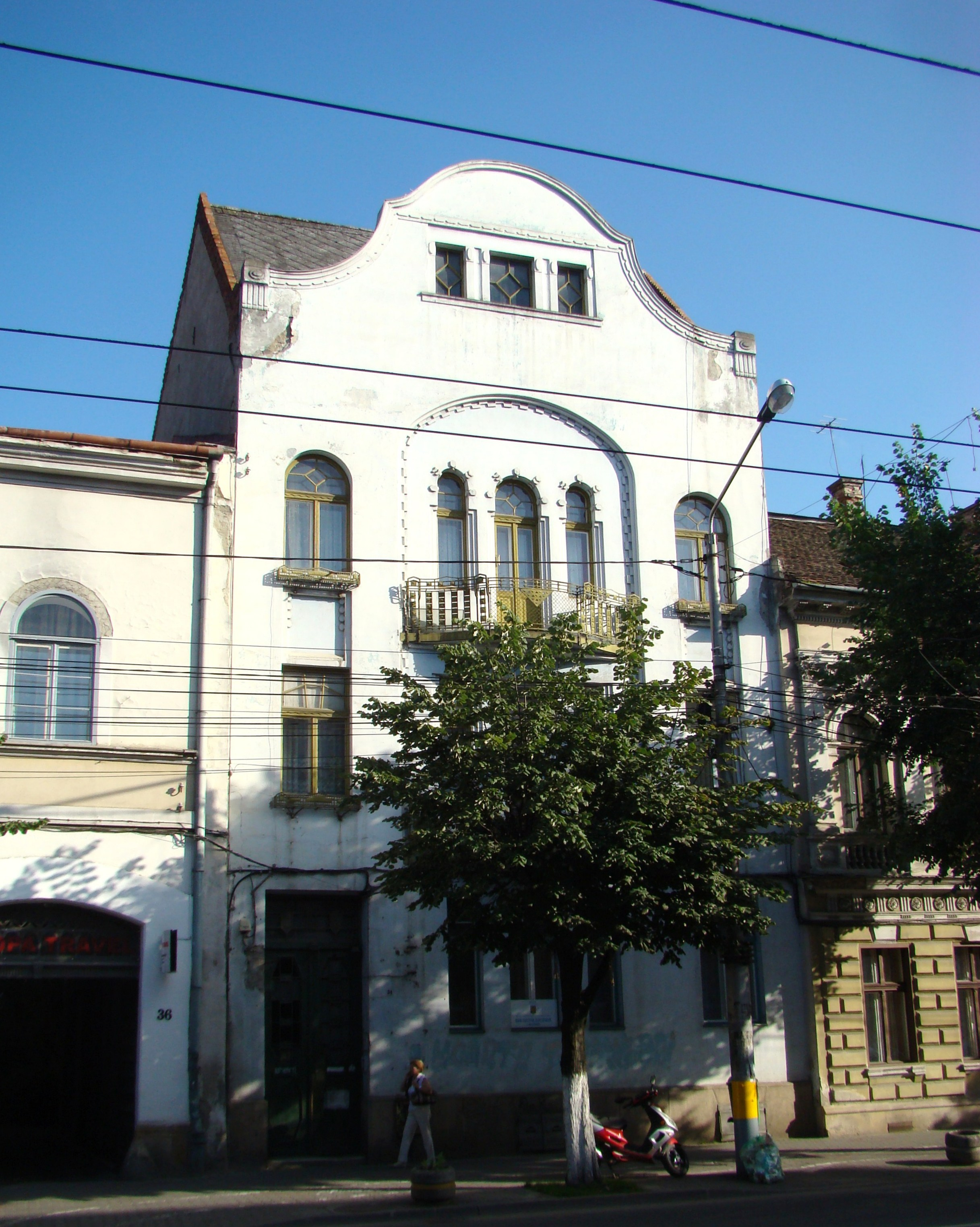 Casă, monument istoric, Bd.21 Decembrie 1989, nr.34